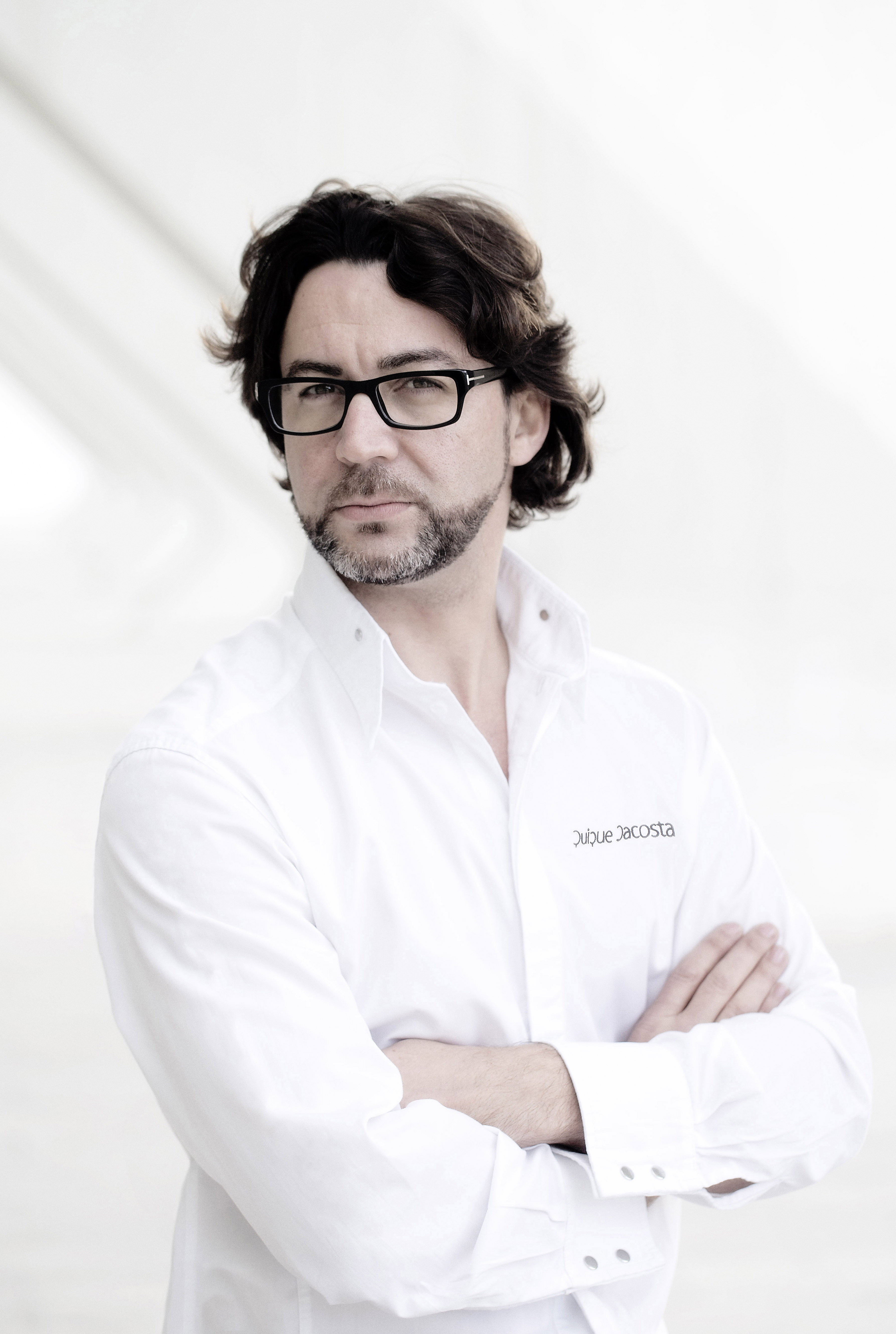 Fotógrafo: Mikel Ponce